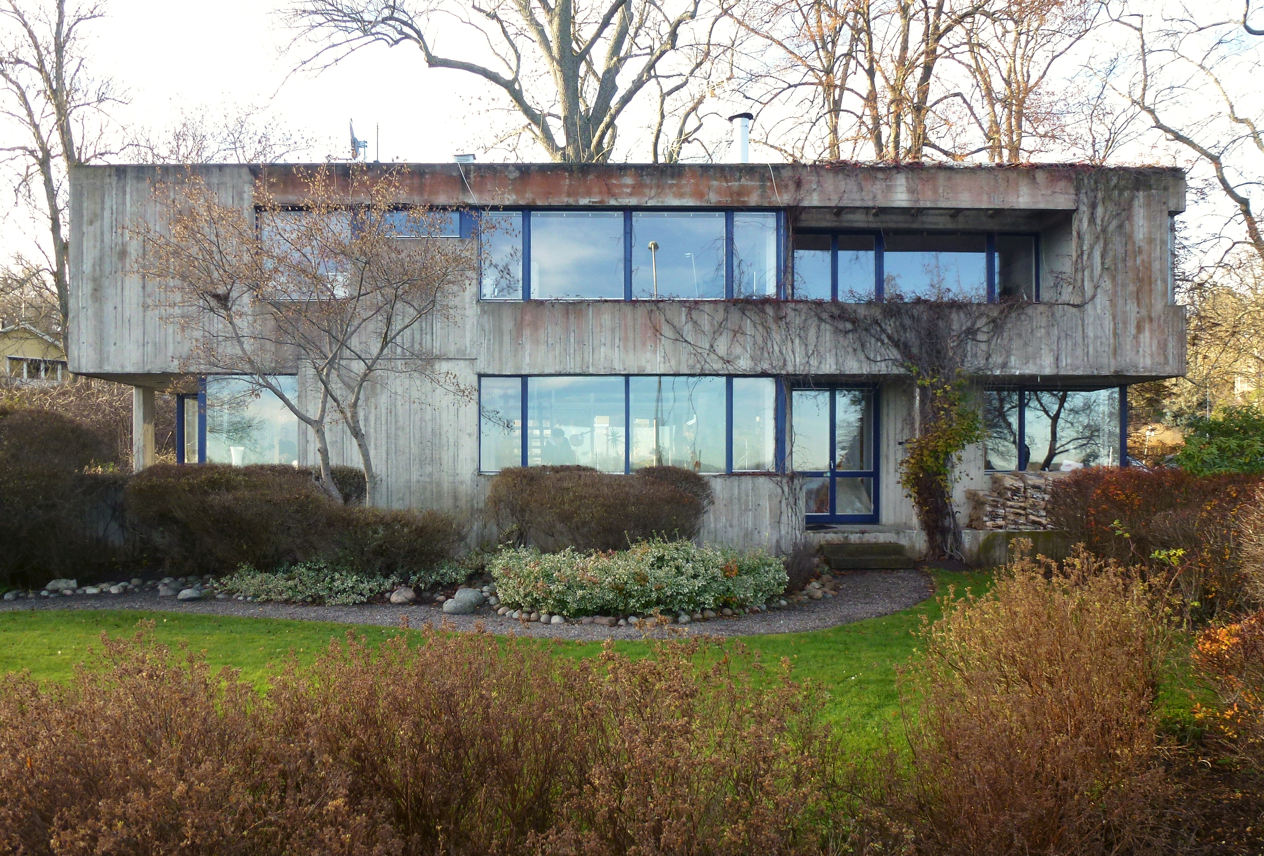 Villa Delin, fasad mot Stora Värtan, arkitekt Léonie Geisendorf